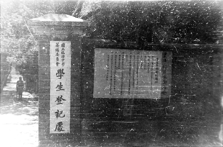 1938年汪伪政权在南京金陵大学内设立“临时大学”，在金陵中学内设立“临时中学”，图为1938年金陵中学内“临时中学”筹备委员会学生登记处招牌。